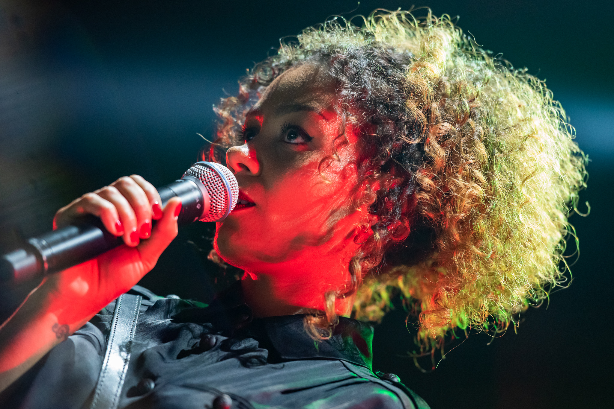 ARGO-Konzerte,Alternarena,Arena Nürnberger Versicherung,Jadu,Konzert,Livekonzert,Livemusik,Musik,RiP,Rock im Park 2019